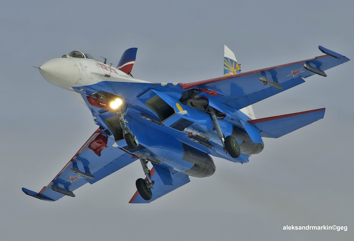 Flight. Su-27